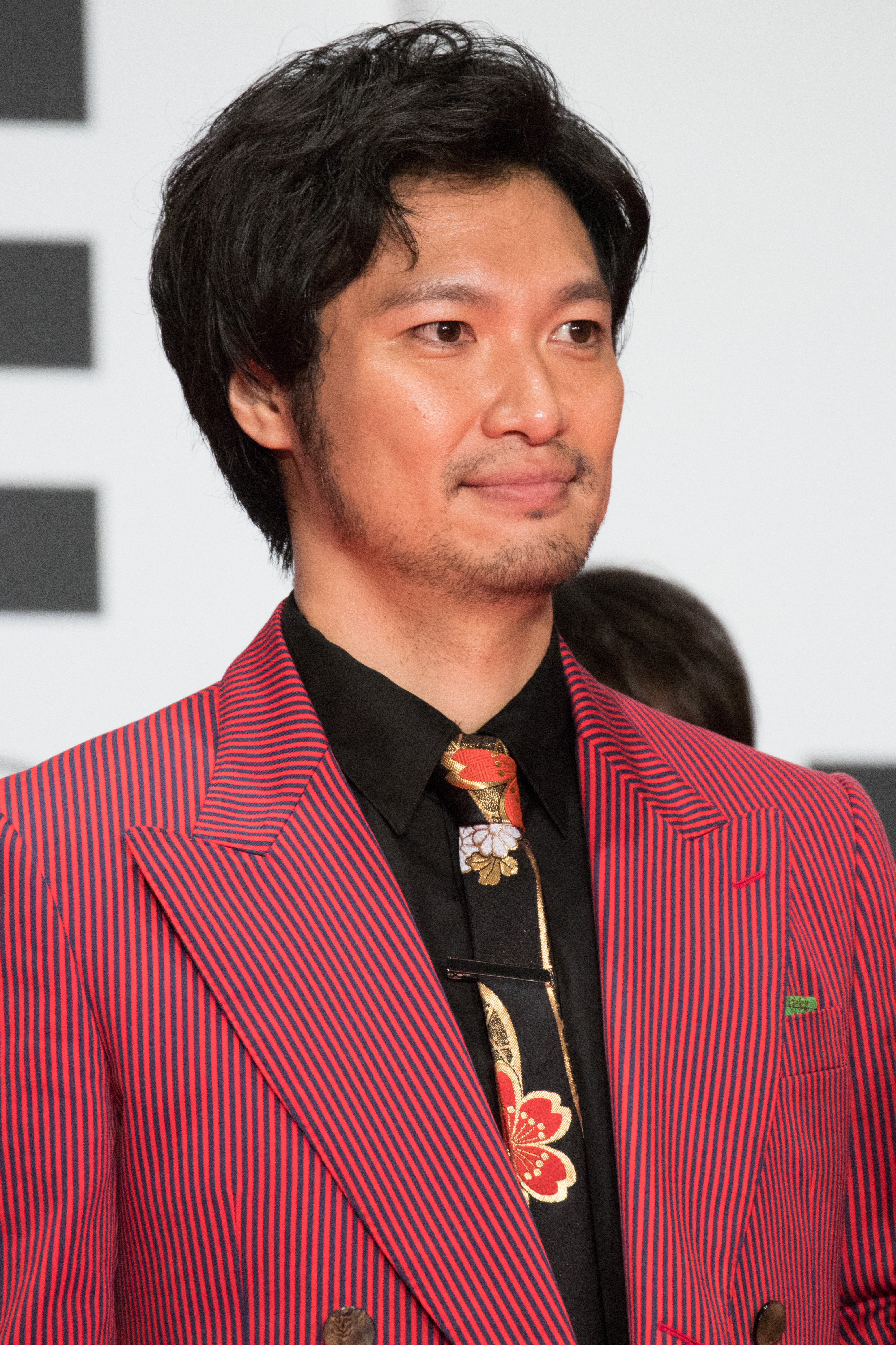 第29回 東京国際映画祭 オープニングセレモニー 青木崇高 (雪女)